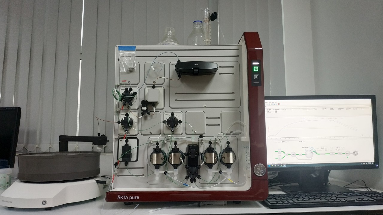 AKTA pure system with fraction collector and pc for control